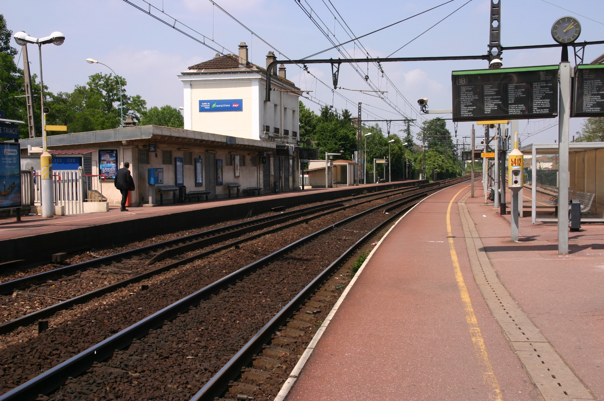 La gare de Villeneuve-Triage, Villeneuve-Saint-Georges, département du Val-de-Marne, France